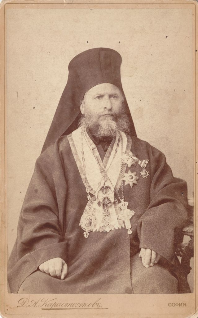 Доситей Самоковски.